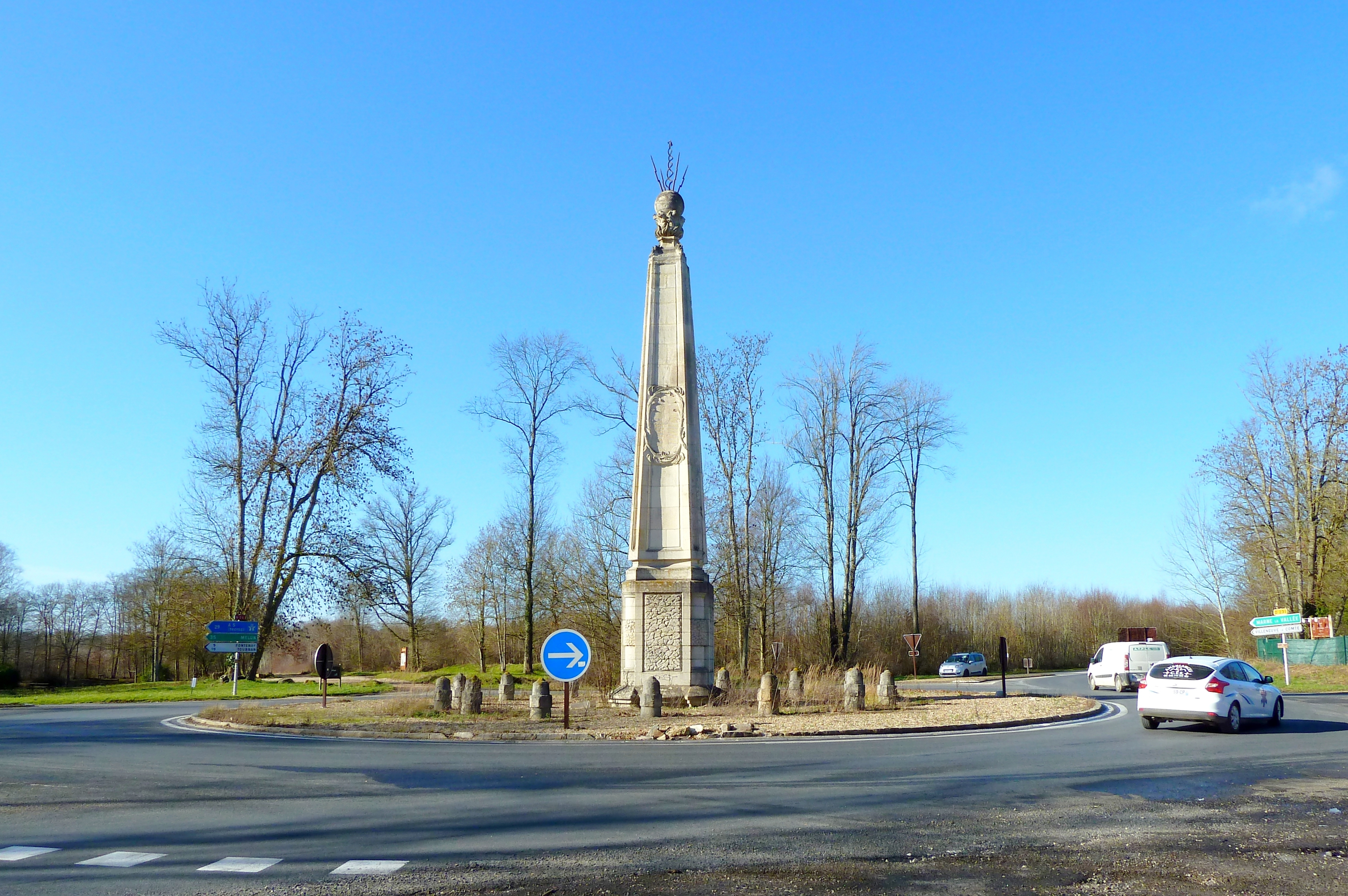 Villeneuve-le-Comte (77), Carrefour de l'Obélisque : carrefour formant une étoile à 6 branches parfaitement régulière, situé au milieu de la Forêt Domaniale de Crécy (Crécy-la-Chapelle) dont il constitue le point culminant, à 134 mètres, formé par la RN 36 (reliant Melun à Meaux, ancienne voie romaine), la RD 231 (depuis 1933, anciennement RD 31, reliant Lagny-sur-Marne à Provins, ancienne voie romaine, partant du camp romain situé à l'est de l'actuel Villeneuve-le-Comte) et la Route pavée (ancienne voie romaine reliant Neufmoutiers à Sainte-Avoye) où passe le Sentier de grande randonnée 14 (De Paris à Malmedy – « Sentier de l'Ardenne ») - Il se trouve en limite de 3 communes : Villeneuve-le-Comte, Mortcerf et Dammartin-sur-Tigeaux - Monument Historique, Fiche Mérimée : PA00087324, classement par arrêté du 1er octobre 1921 - Ouvrage d'art construit au XVIIIe siècle (1735) pour commémorer la rencontre de Louis XV et du Duc de Brandebourg dans le rendez-vous de chasse situé à proximité. Le bas-relief qui était sculpté sur cette face orientée vers l'est, dans le médaillon (représentant un symbole royal, sceptre ou main de justice?) a été vandalisé à la Révolution. La colonne mesure environ 14 mètres de haut, surmontée d'un globe terrestre submergé par les vagues et frappé par des éclairs de foudre et elle est entourée d'un cercle de 15 bornes. Ce monument est référencé dans un ouvrage publié en 1930 par Fulcaneli, intitulé: « les demeures philosophales ». Selon lui, ce serait un monument porteur d’une terrible symbolique (la destruction du monde par l'eau et le feu), un monument essentiel pour les amateurs d’ésotérisme et passionnés d’alchimie.